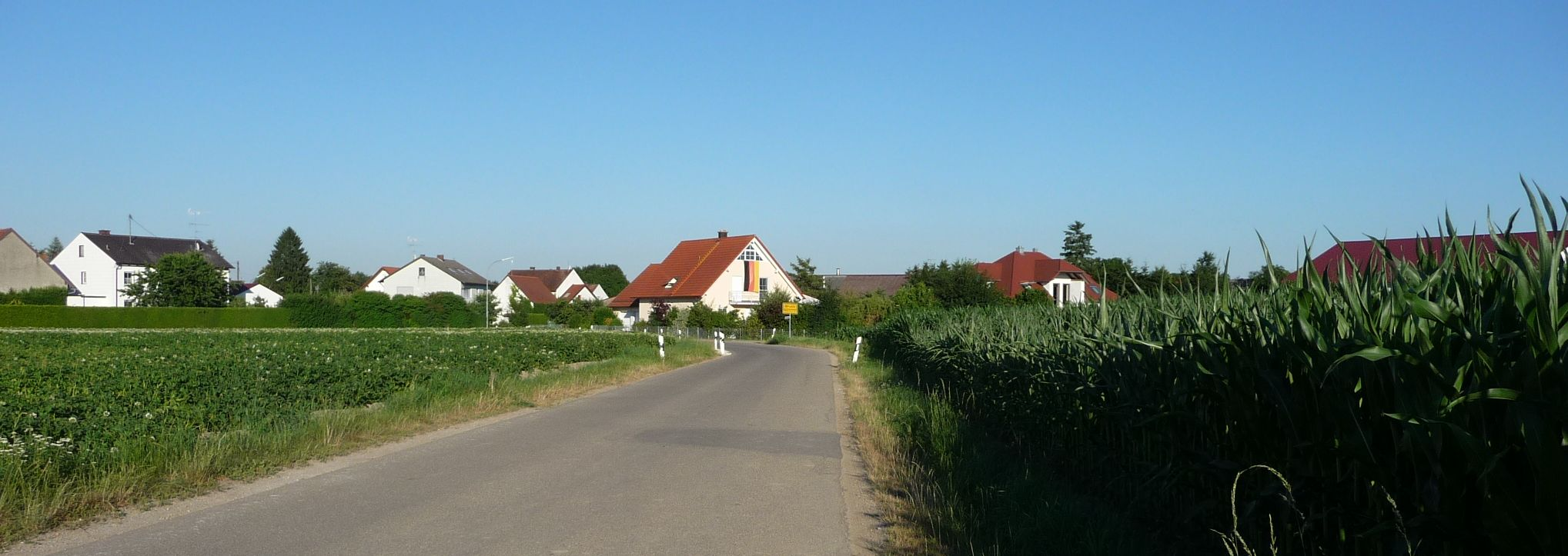 Panoramabild von Bruck bei Neuburg